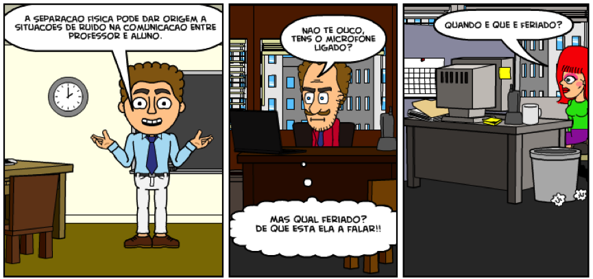 Ensino à distância e distância transaccional